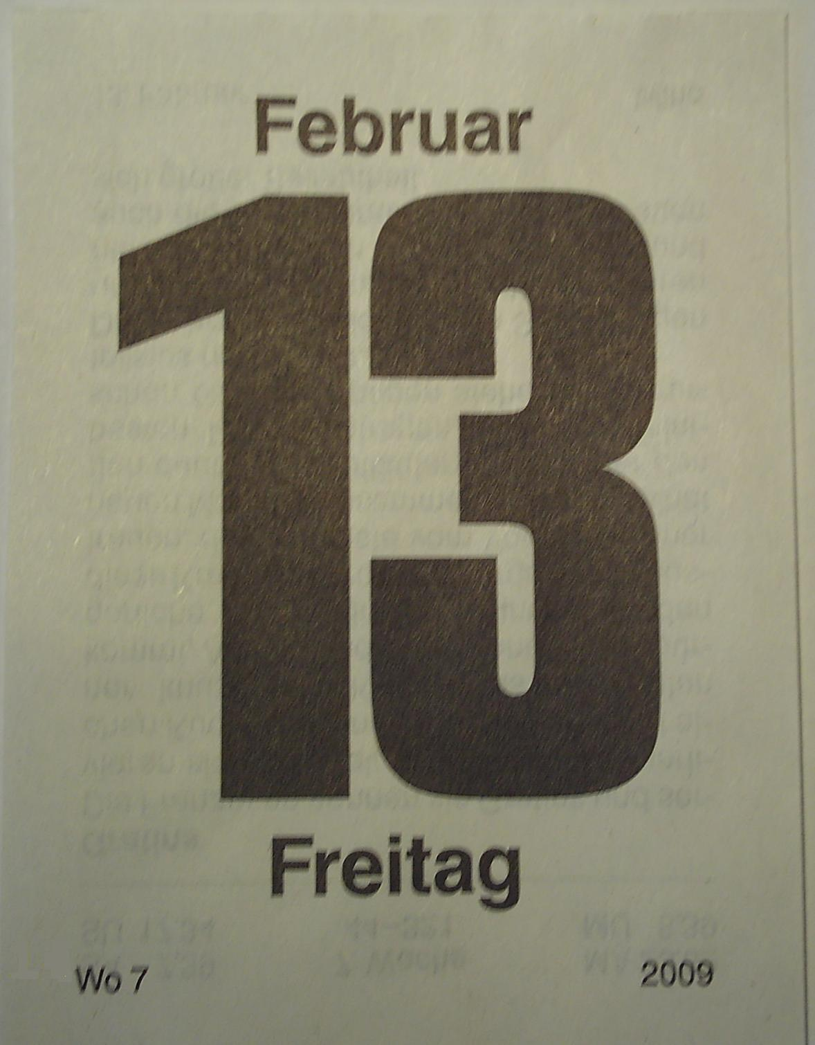 Kalenderblatt mit Freitag, dem 13.